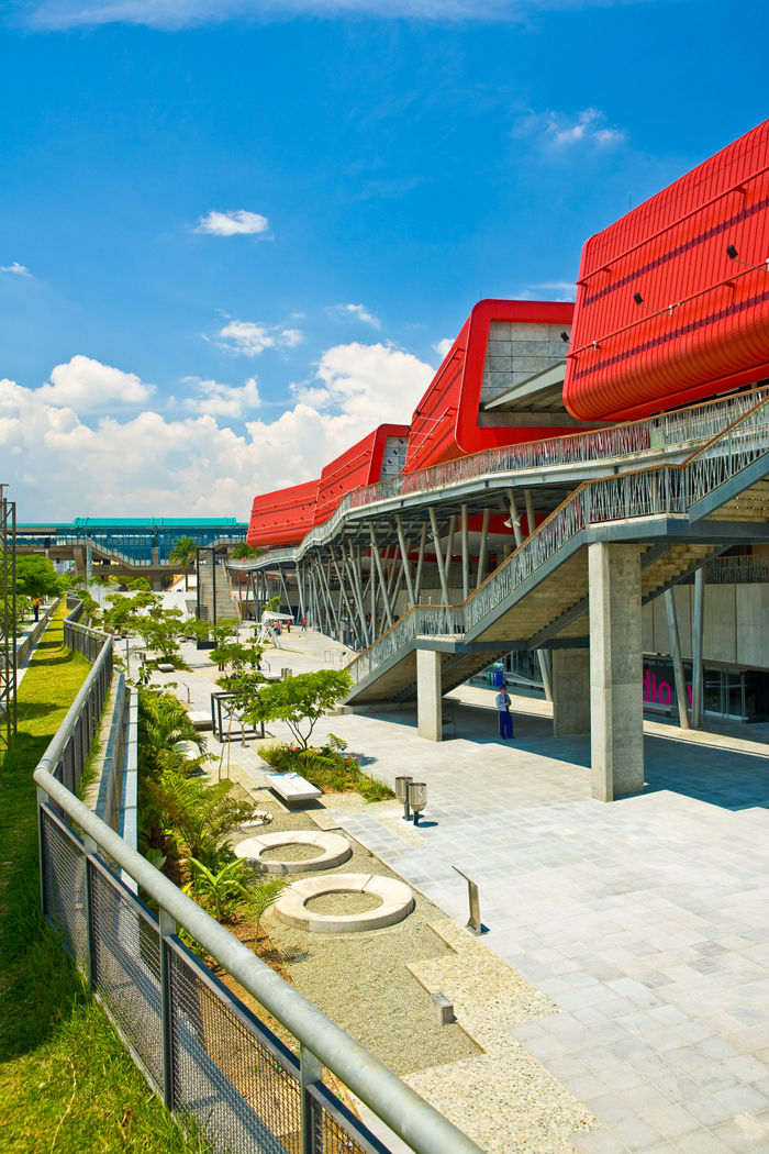 Exterior del Parque Explora (a la derecha), Medellín. Al fondo se aprecia la Estación Universidad del metro.